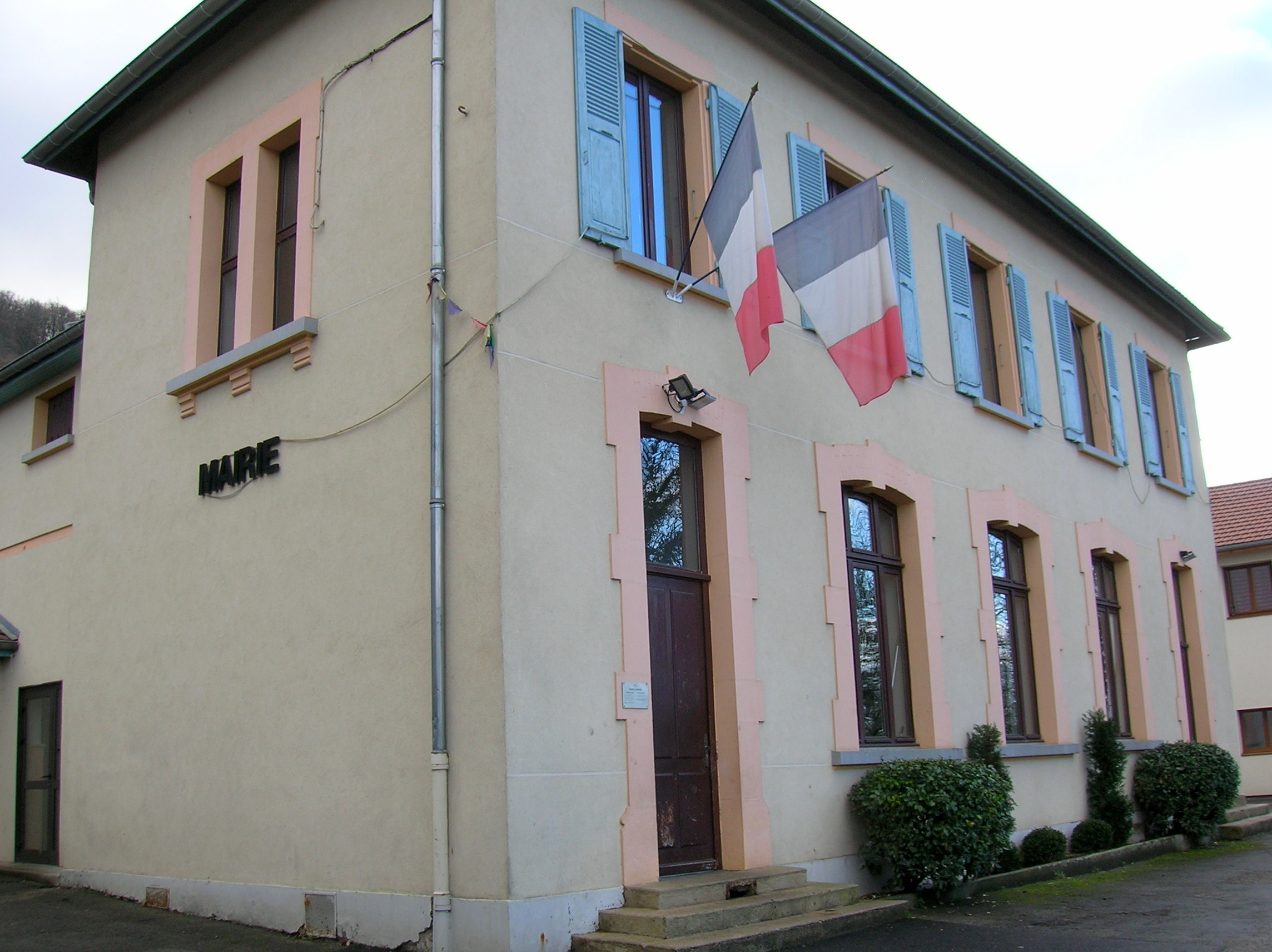 mairie. Murianette, Isère, France.